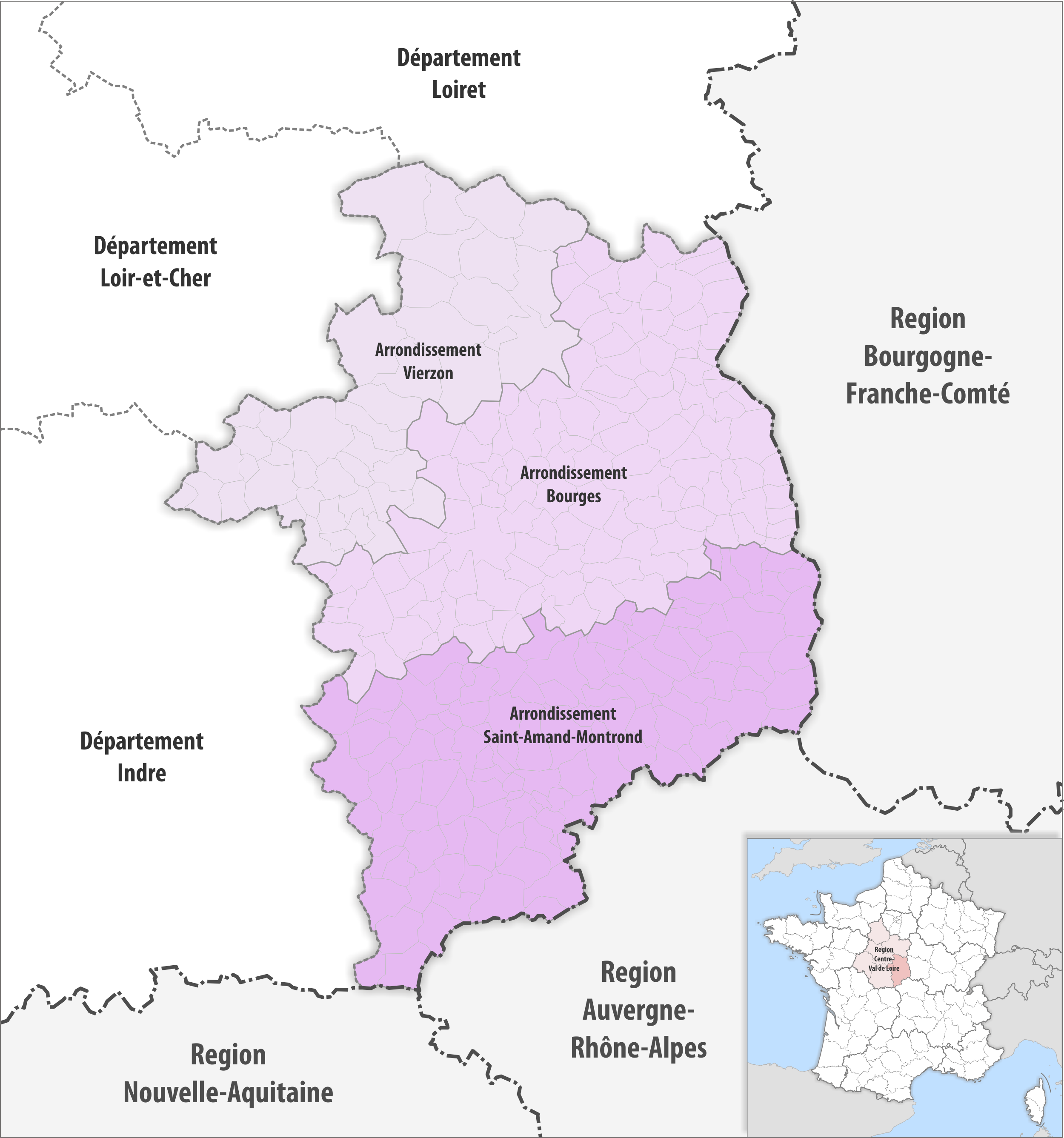 Gemeinden und Arrondissemente im Departement Cher